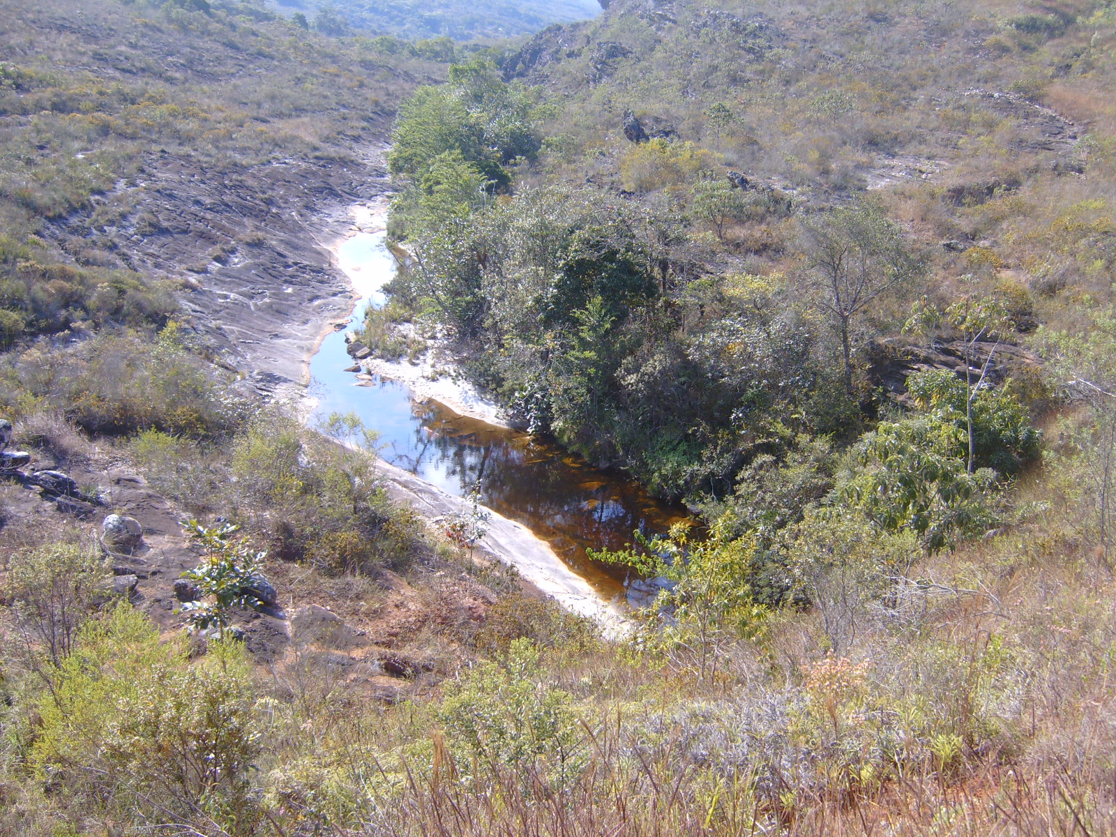 Nascente do Rio Jequitinhonha (Serro-MG), Brasil